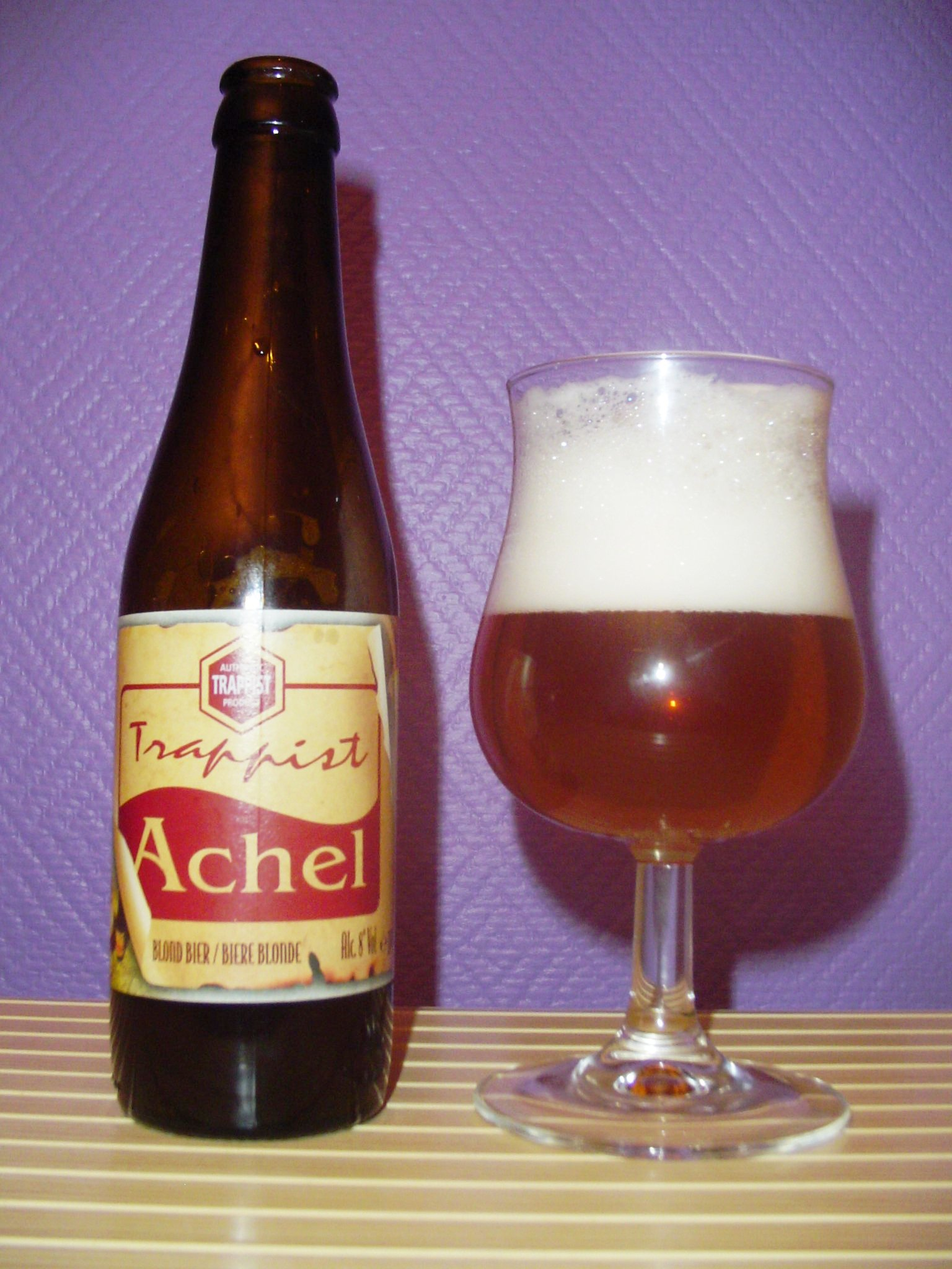 Achel trappist beer (Belgium).